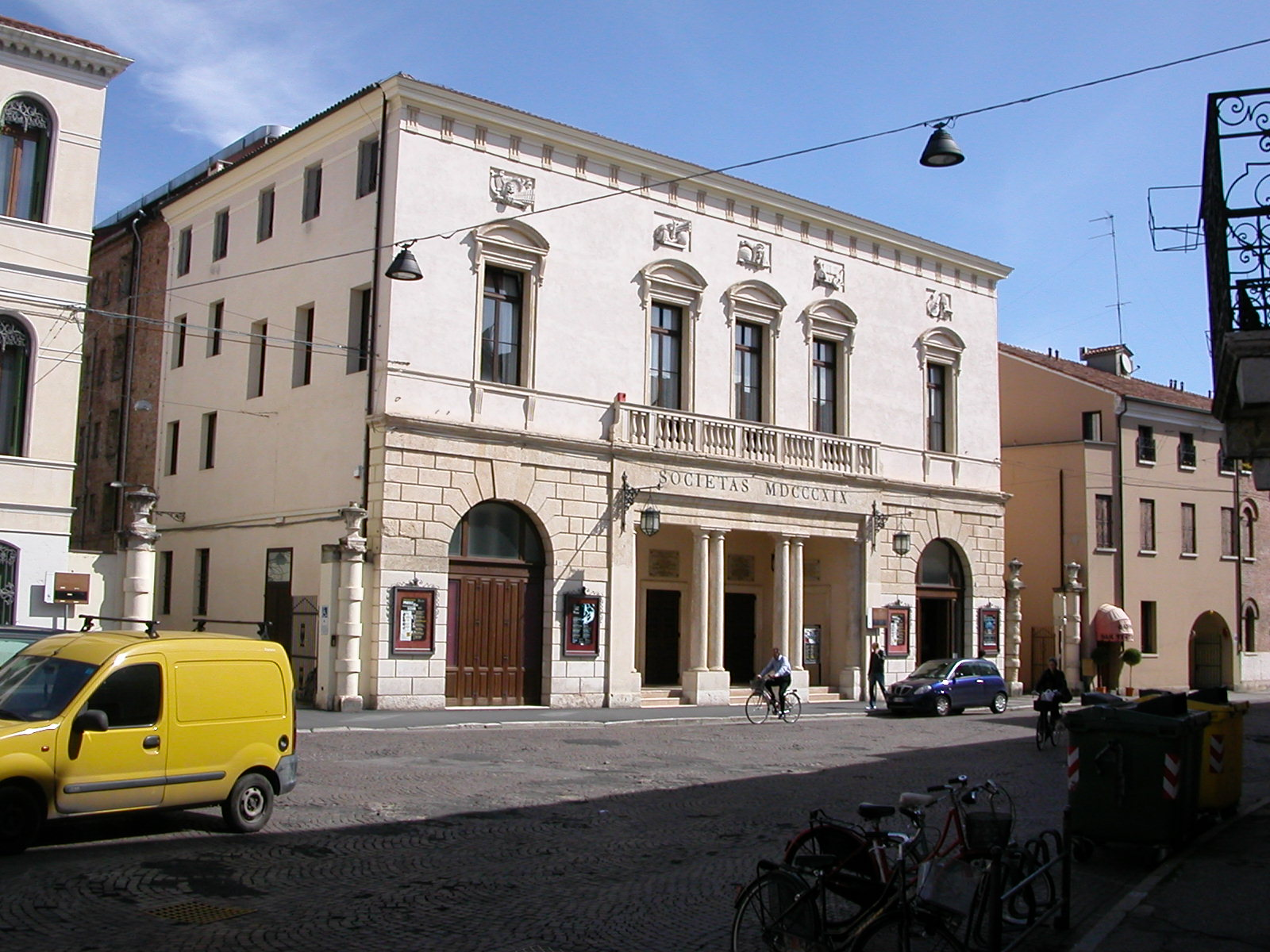 Teatro Sociale, piazza Garibaldi, Rovigo